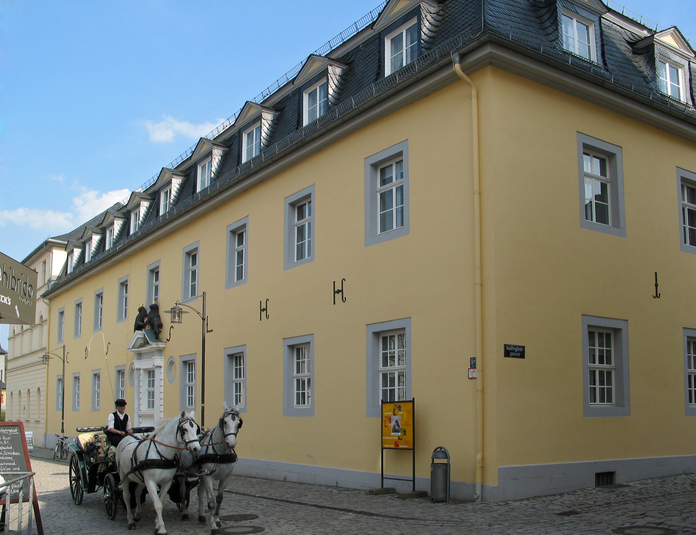 Das Gelbe Schloss am Burgplatz in Weimar. Nordansicht, an der Ecke: Kollegiengasse/ Grüner Markt. Hier wurde 1761 August von Kotzebue (1761-1819) geboren.